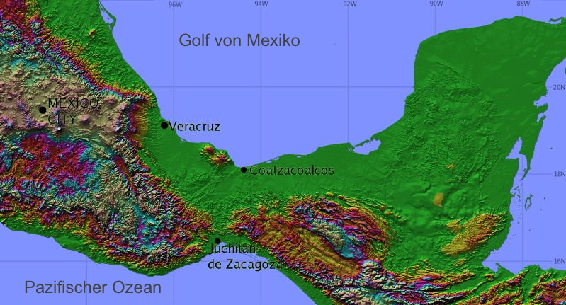 Schattierte reliefkarte des mexikanischen Isthmus von Tehuantepec.